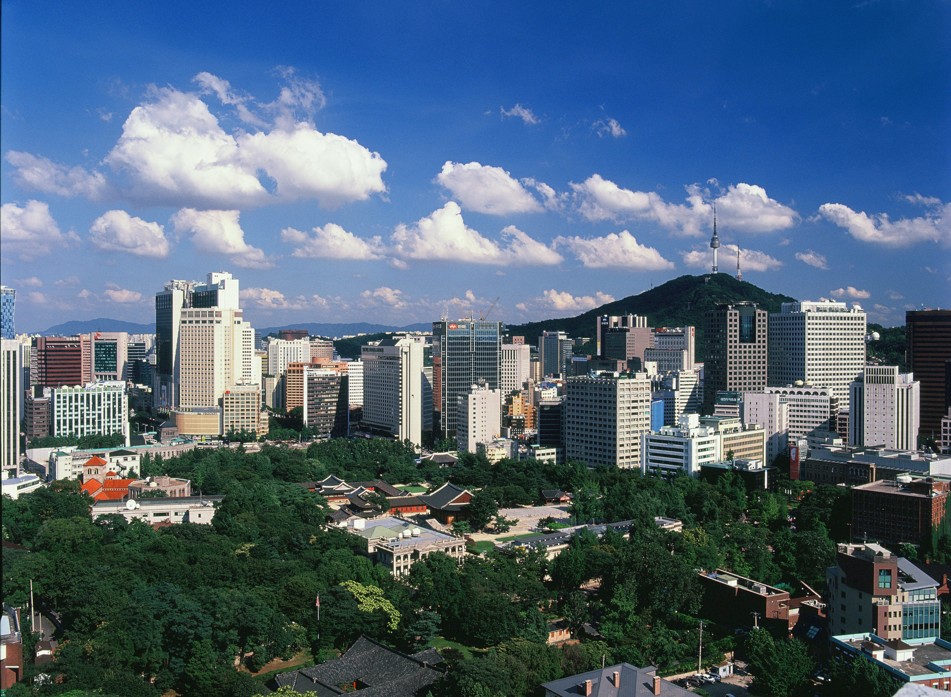 Photos of Seoul Metropolitan Fire & Disaster Headquarters